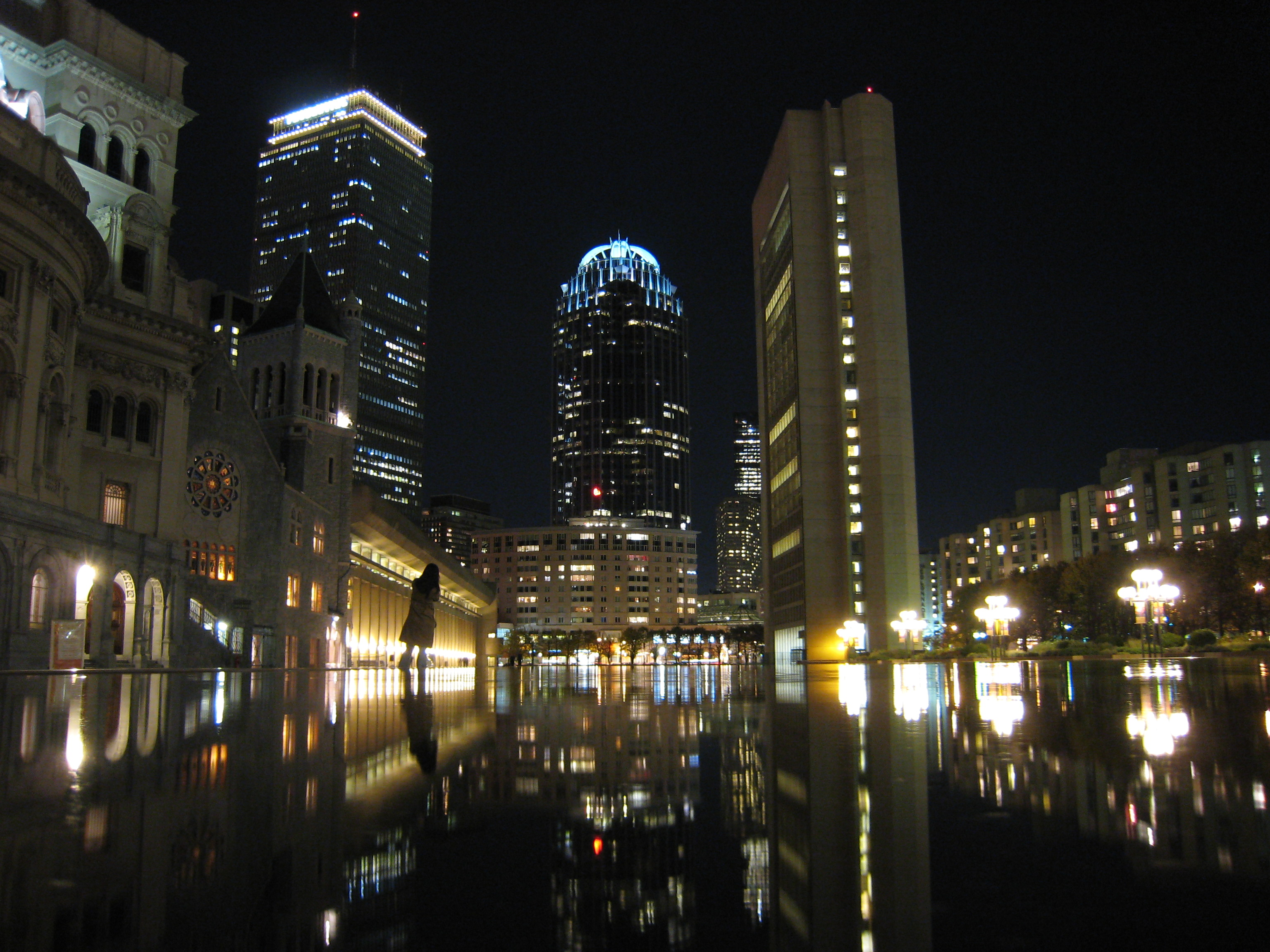 Boston bei Nacht, Innenstadt in der Nähe des Prudential-Tower/ Messegelände